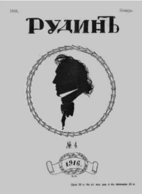 Rivista "Rudin", n. 4, 1916